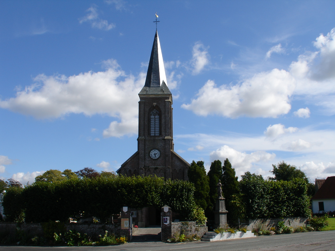 Église de Saint-Josse